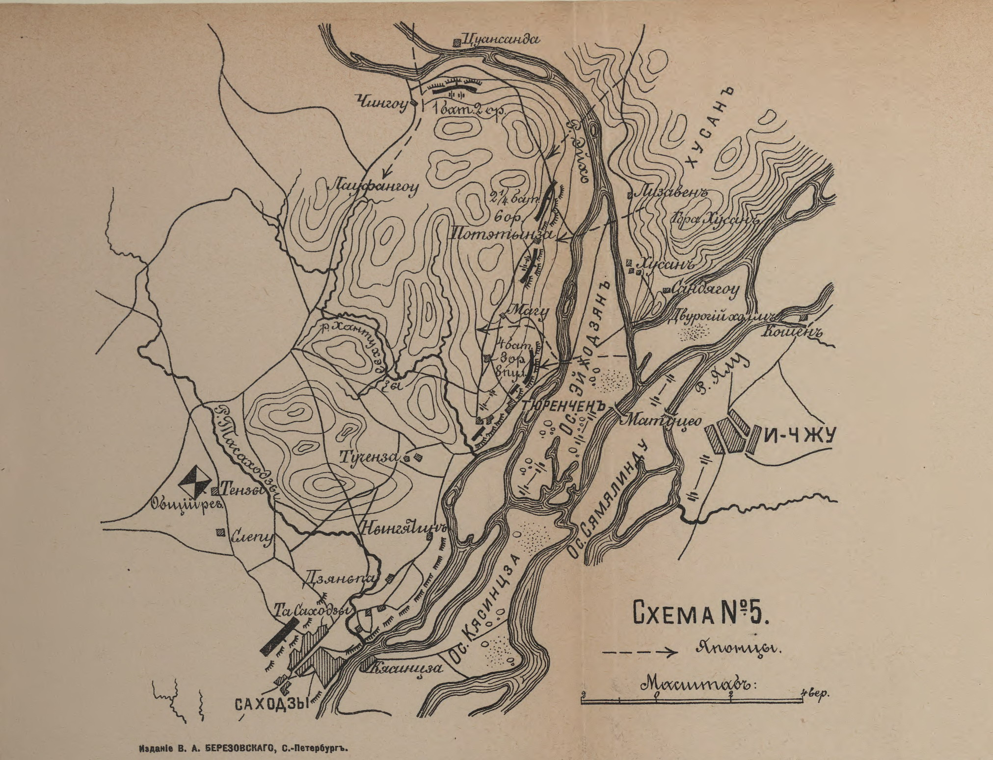 Battle of Yalu River map. Карта боя на реке Ялу (Тюренченский бой).